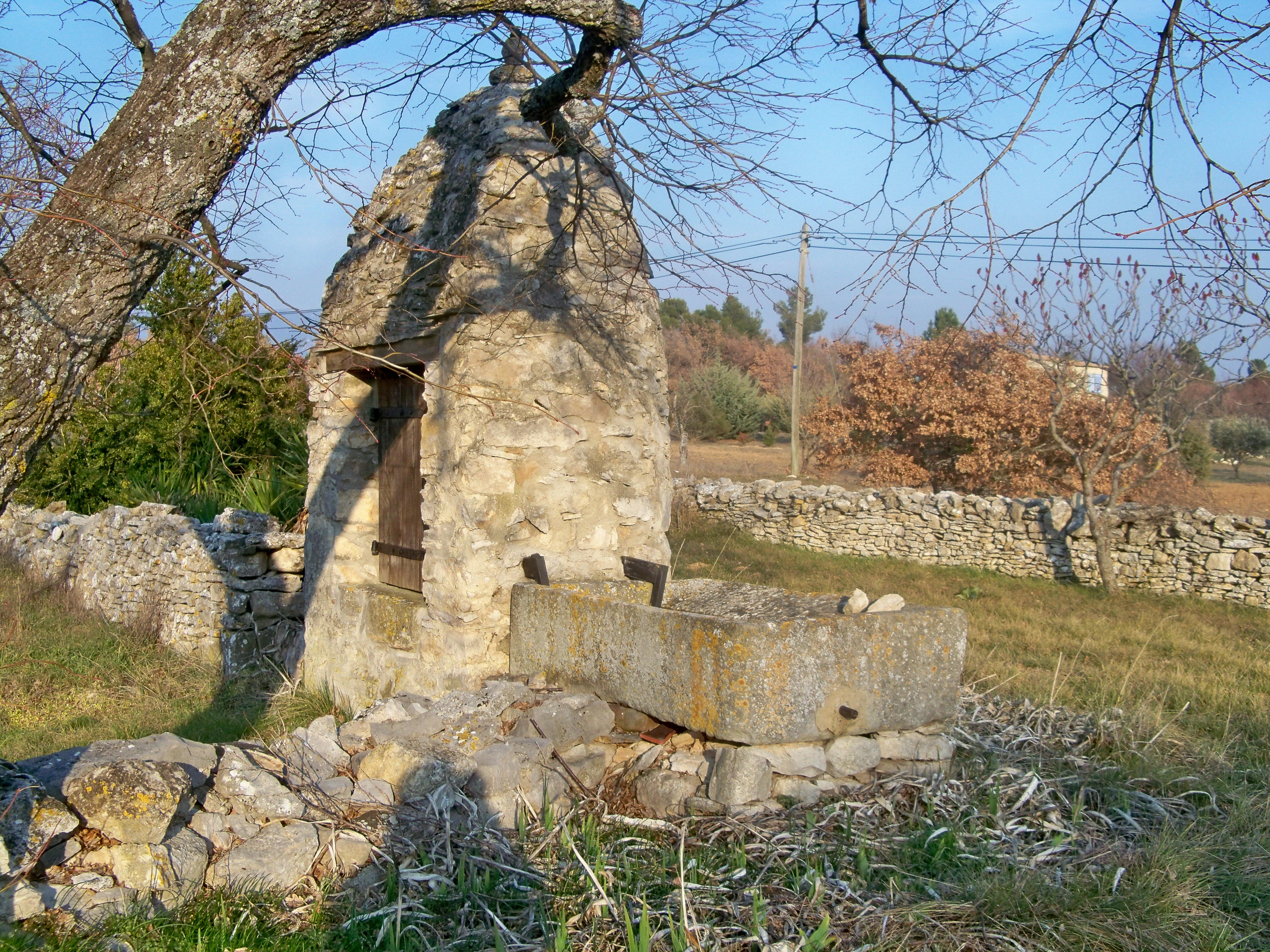 Puit couvert à Apt,Vacluse, France